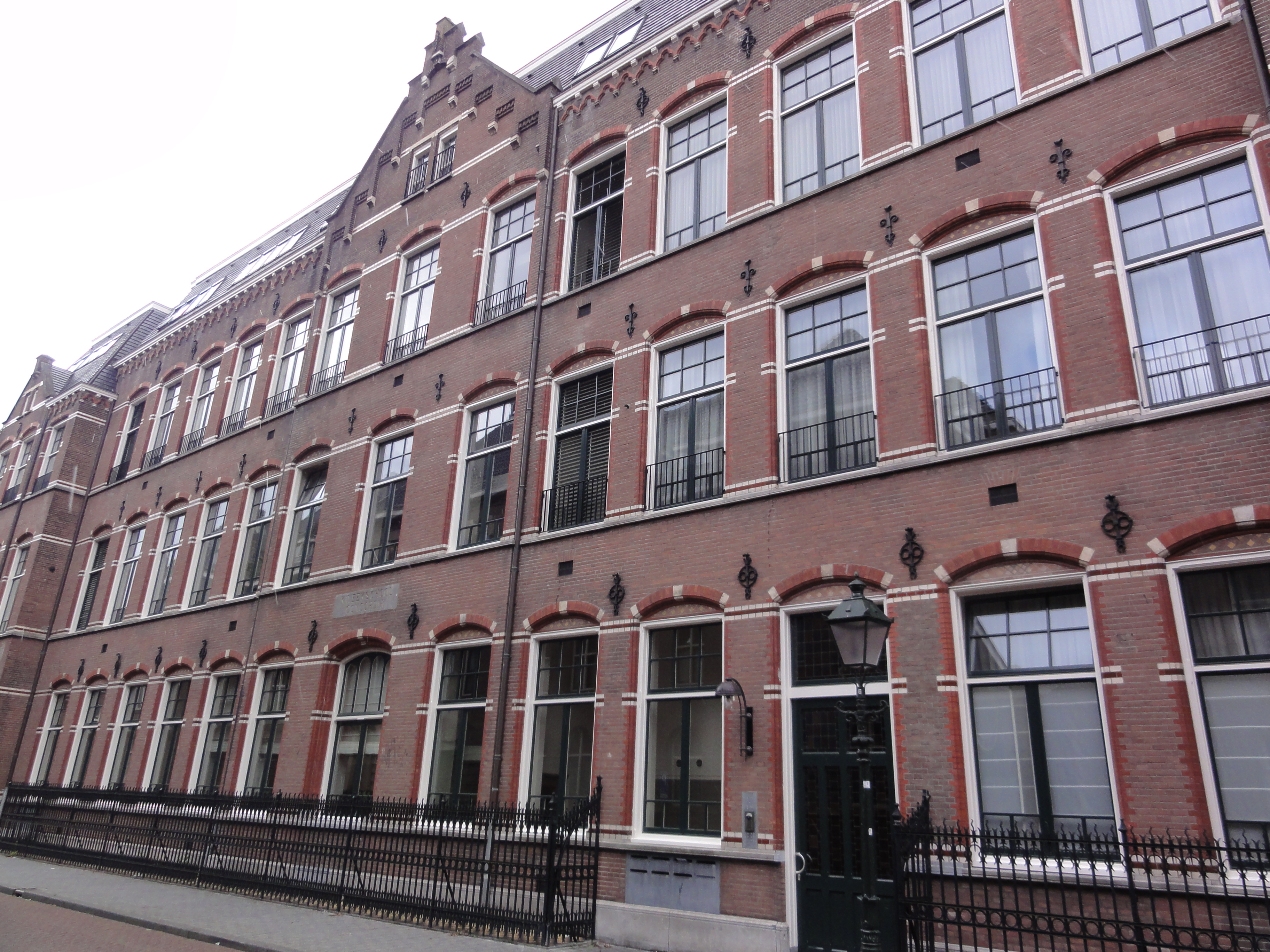 's-Hertogenbosch Rijksmonument 522396 Papenhulst 1,3 33″ N, 5° 18′ 32.12″ E